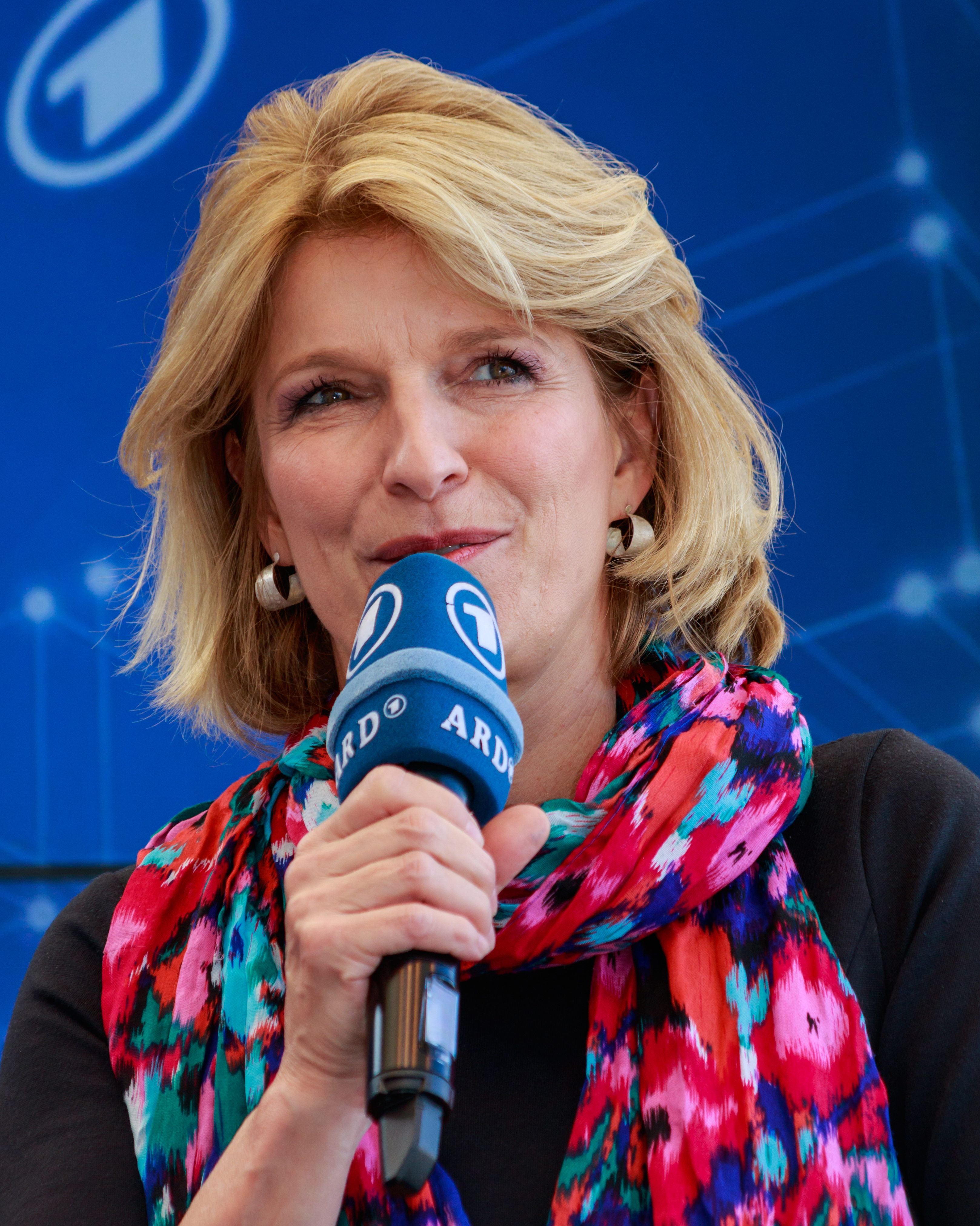 Tag der Offenen Tür Berlin 2015: Susanne Holst